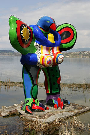 Murten: Skulptur von Nikki St.Phalle